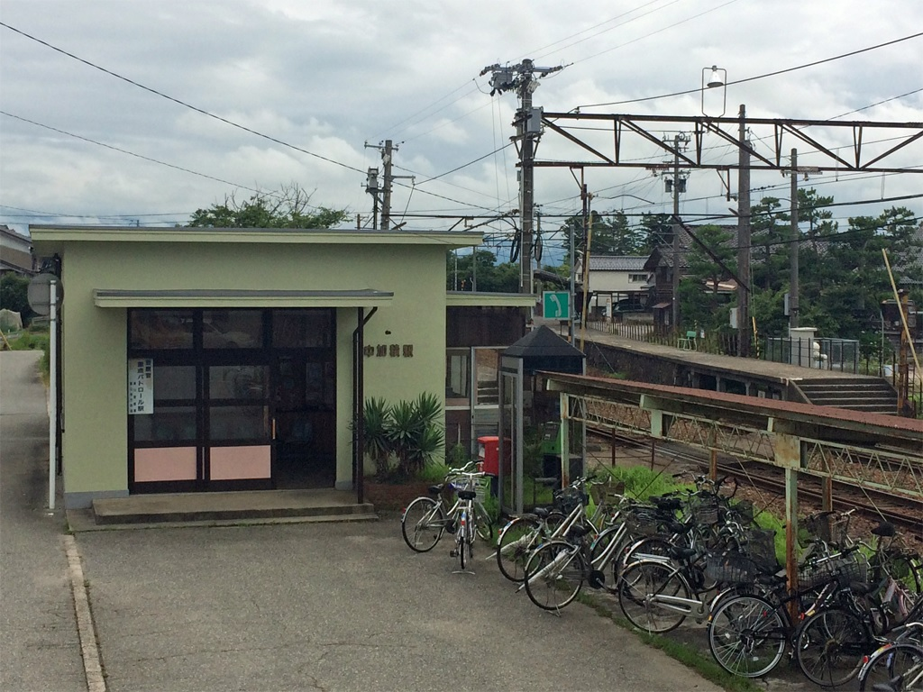 富山地方鉄道本線 中加積駅